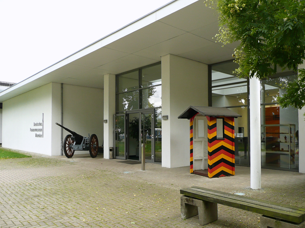 Eingang Panzermuseum Munster